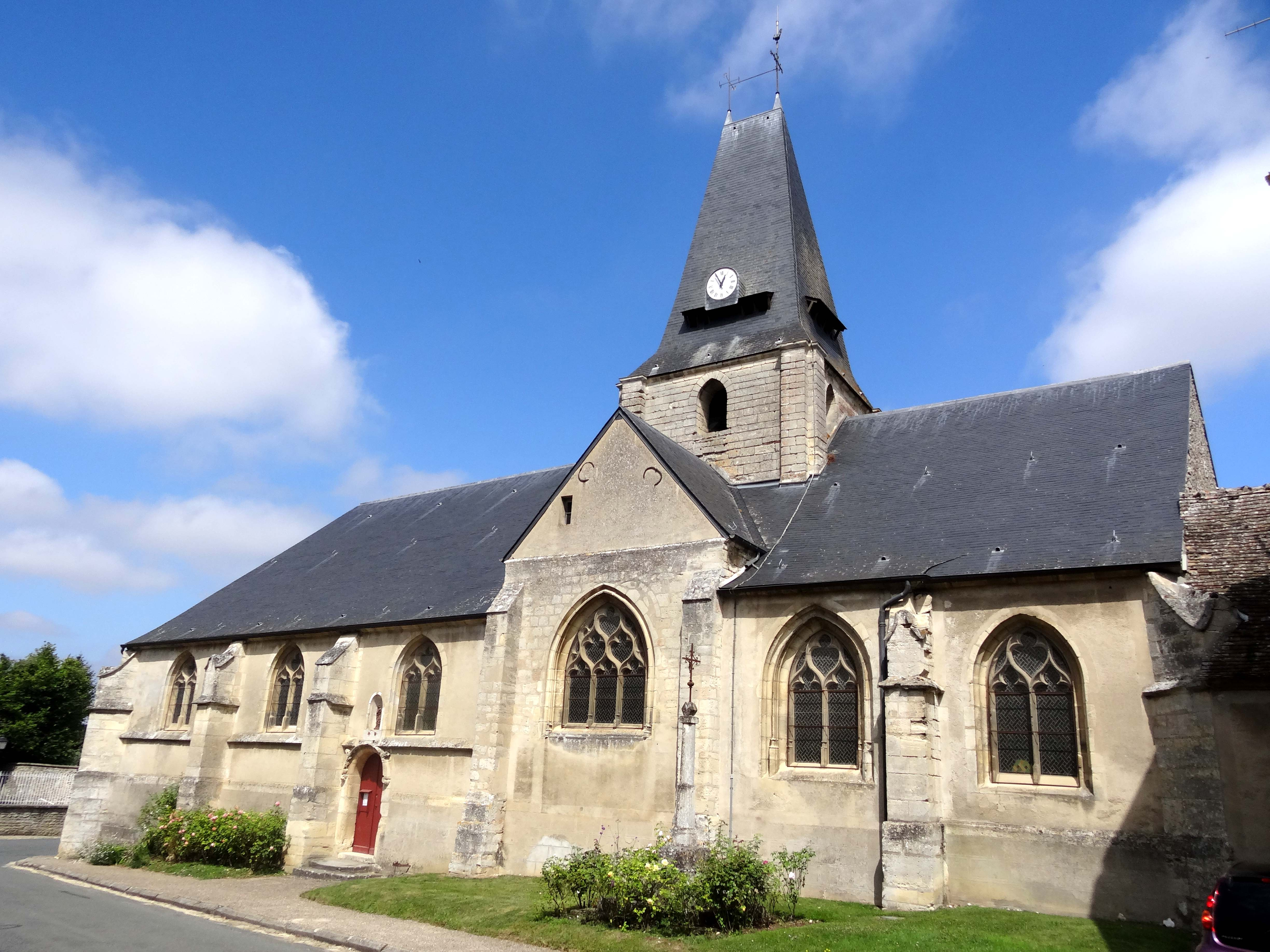 Église Saint-Germain de Boury-en-Vexin - voir titre.